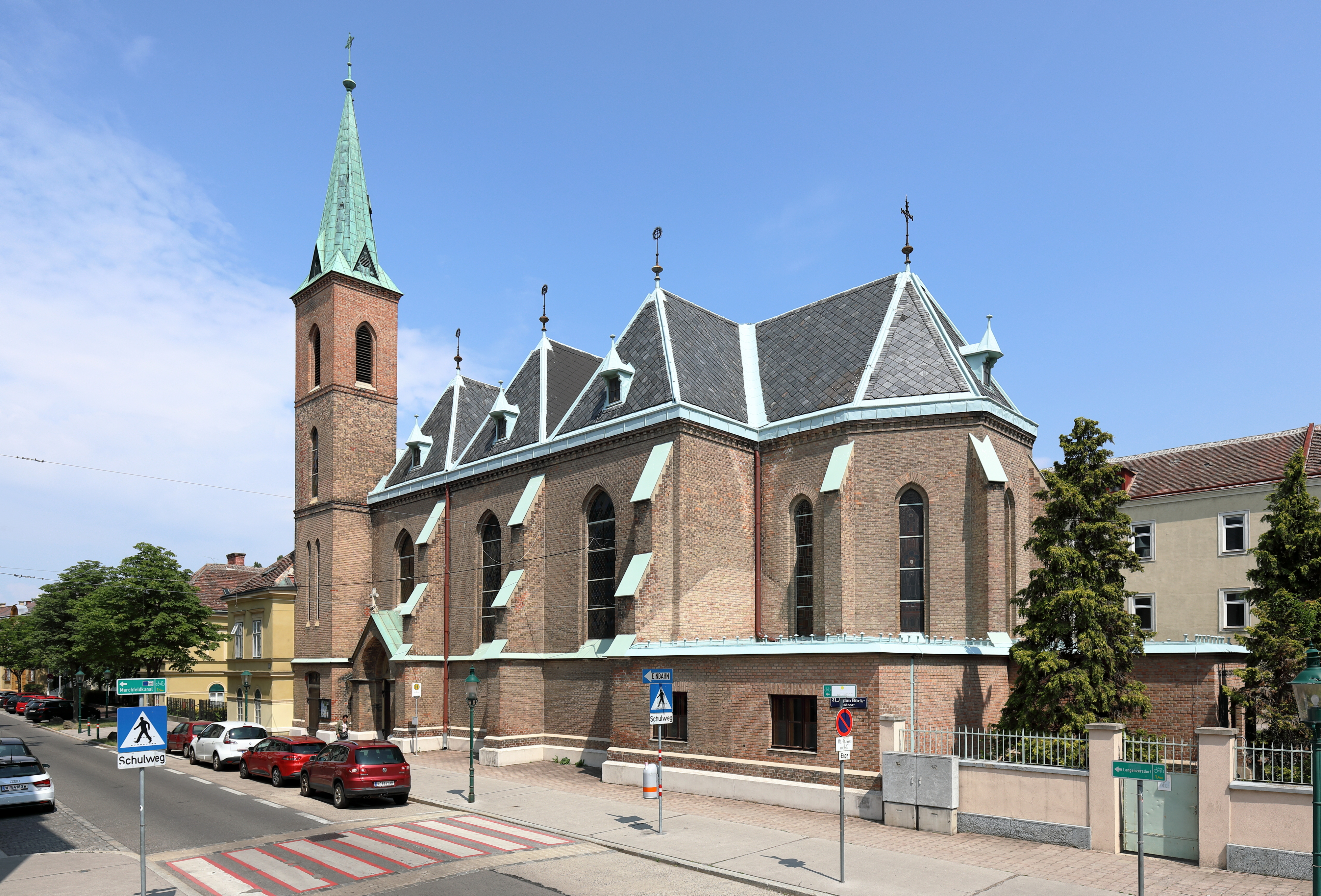 Die Klosterkirche Maria Immaculata, auch Schulbrüderkirche bezeichnet, an der Adresse Anton-Böck-Gasse 16 in Strebersdorf, ein Wiener Stadtteil im 21. Bezirk Floridsdorf. Die neugotische, zweischiffige Hallenkirche wurde 1887/1888 nach Plänen von Josef Schmalzhofer errichtet. Ab der Pfarrerrichtung Strebersdorf 1939 bis anfangs der 1960er Jahre war sie auch zugleich die Strebersdorfer Pfarrkirche.